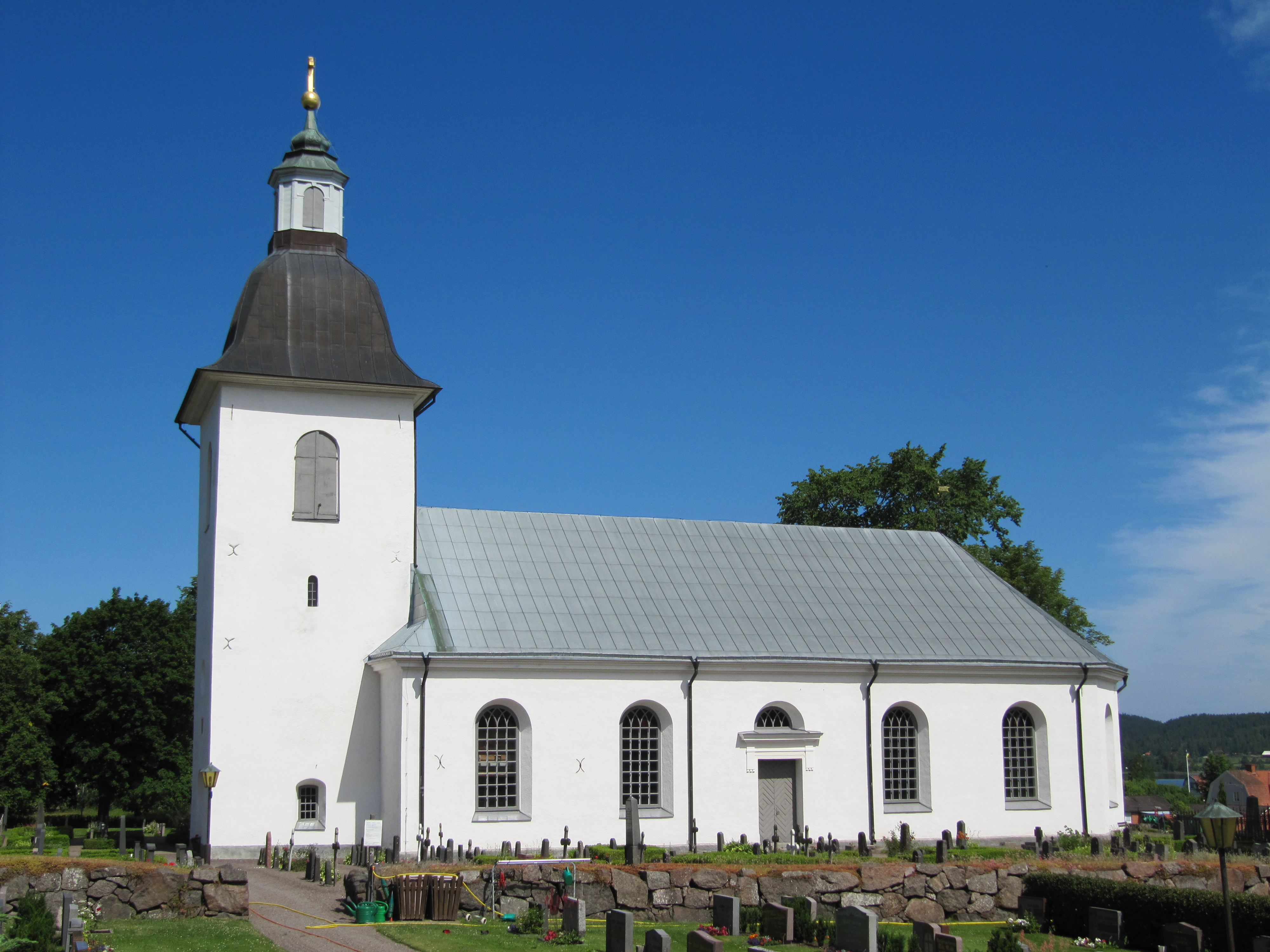 Hycklinge kyrka